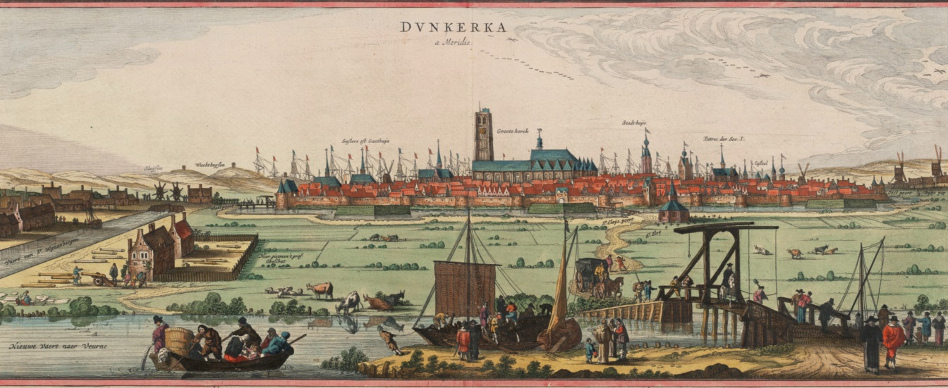 Duinkerken in 1641 (Flandria Illustrata)